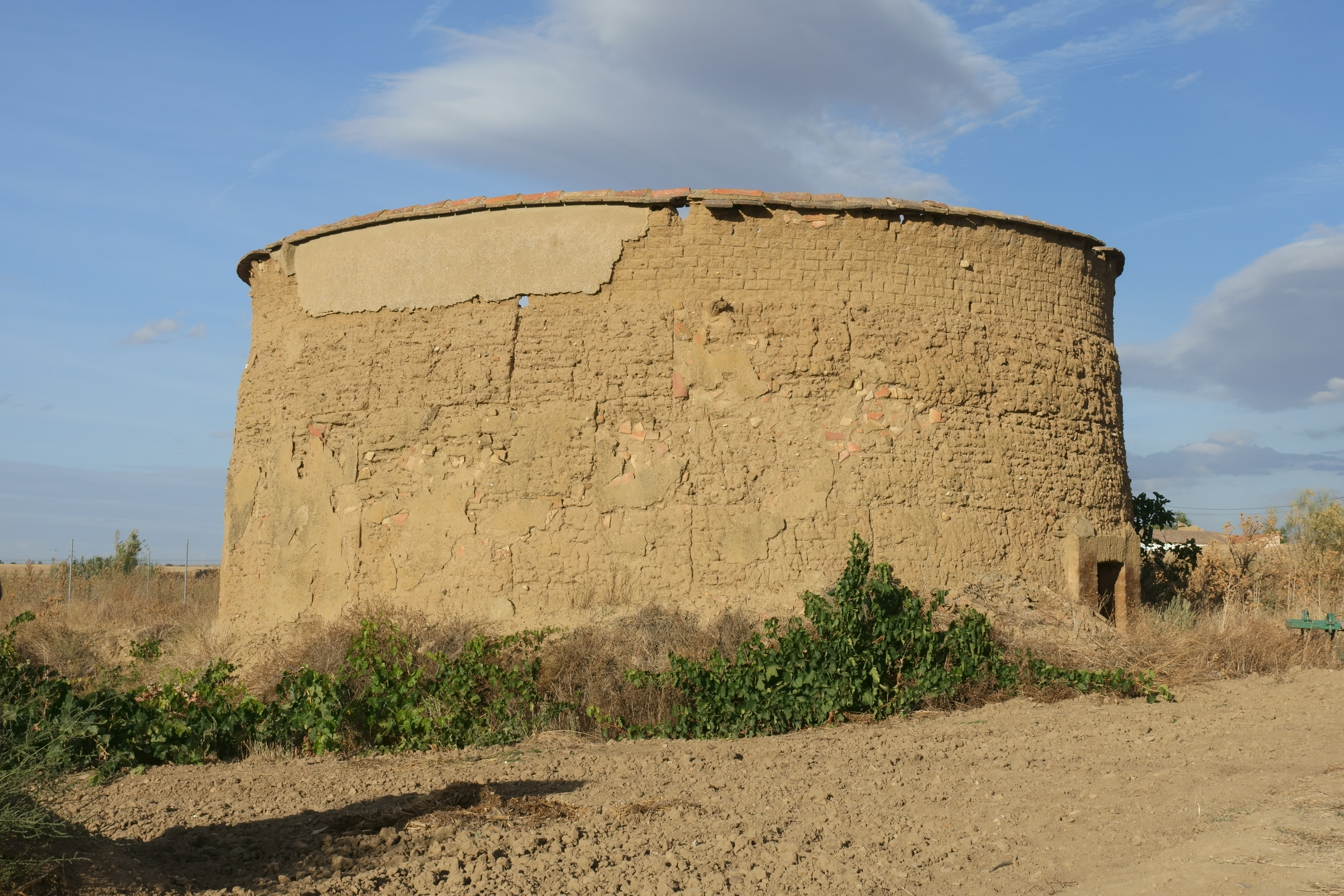 Palomar en Pobladura de Valderaduey (Zamora, España).